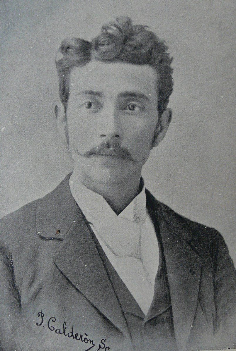 Tomás Regalado Tambien conocido como Último caudillo de Cuscatlán